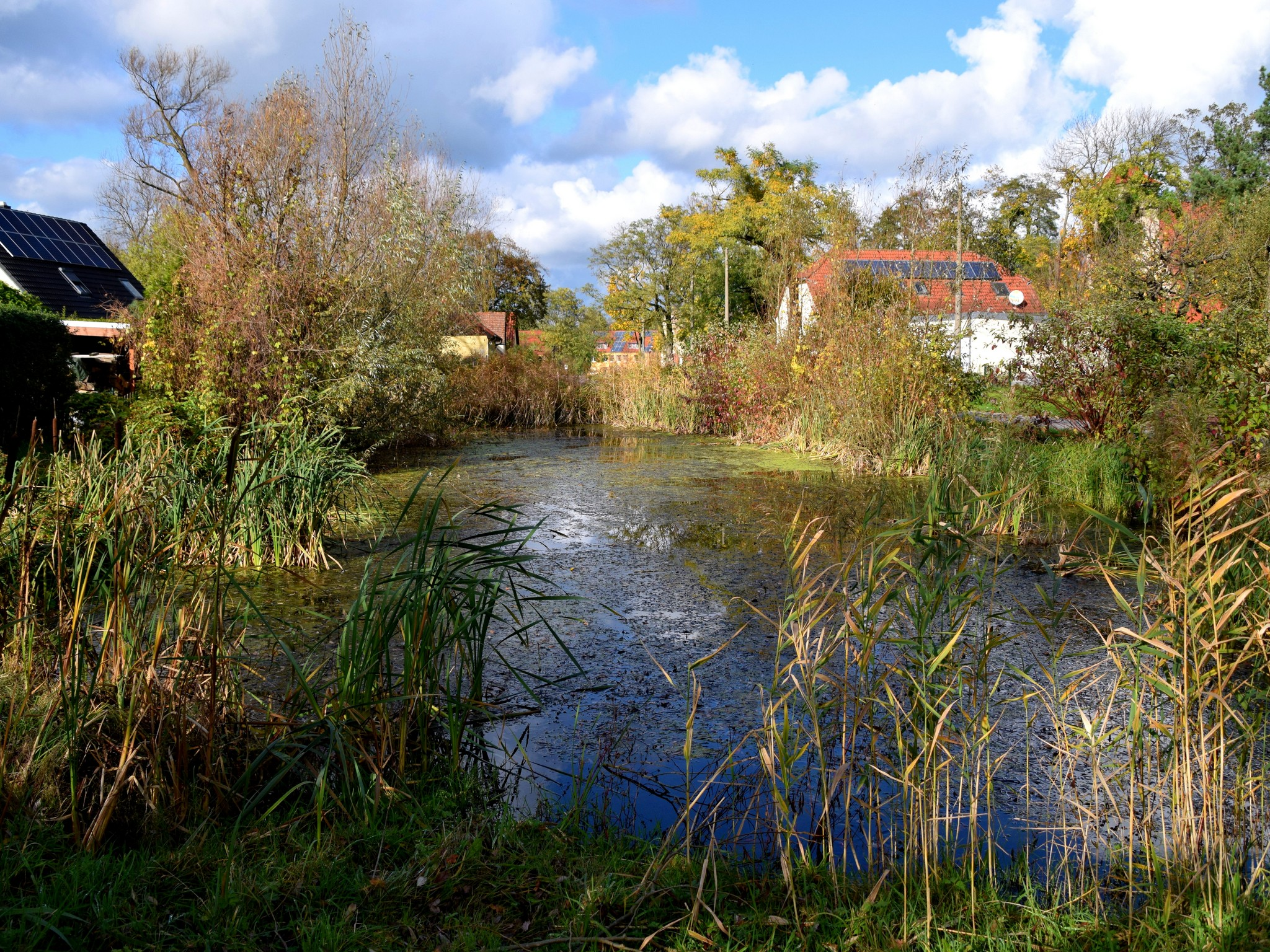 Teich an der Schulstraße in Frankfurt (Oder)-Booßen